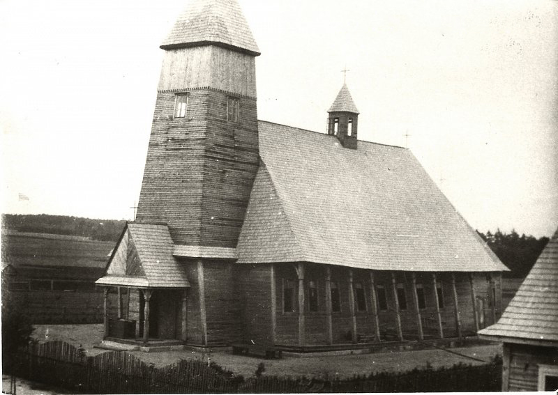 Беларуская (тарашкевіца): Заастравечча (Zaastraviečča). Касьцёл